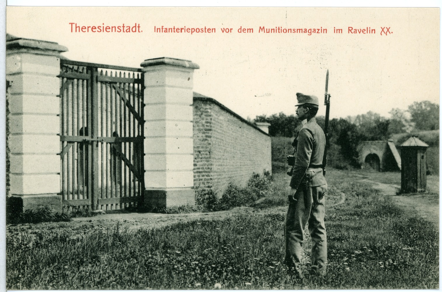 Theresienstadt; Infanterieposten vor dem Munitionsmagazin in Ravelin XX. This postcard is from publisher Brück & Sohn in Meißen ( postcard has a unique number 11052 and is available in a higher resolution at the publisher. This images was uploaded in a cooperation project between Wikipedians and the publisher.